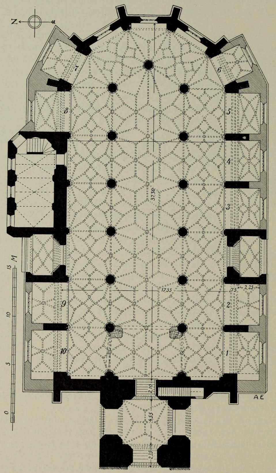 Grundriss der kath. Stadtpfarrkirche St. Johannes, Dingolfing, Landkreis Dingolfing-Landau, Niederbayern, Bayern